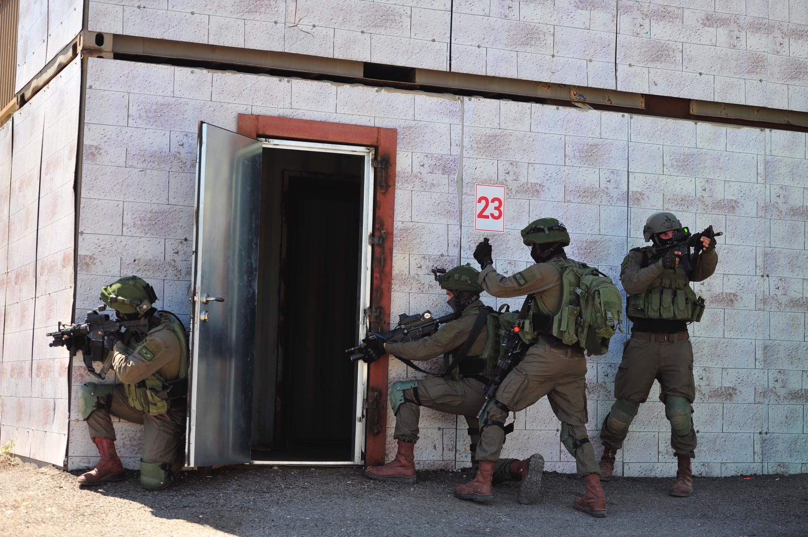 המקום שמכשיר את יחידות צה"ל להילחם בטרור. צליפה, לוחמה תת- קרקעית, לחימה מגובה ותפעול אירועי חירום - אלו רק חלק מהמקצועות עליהם אמון בית הספר ללוחמה בטרור שבבסיס מתקן אדם.